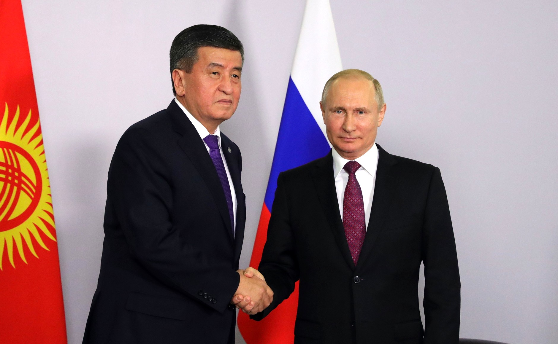 Встреча Президента России Владимира Путина с Президентом Киргизии Сооронбаем Жээнбековым